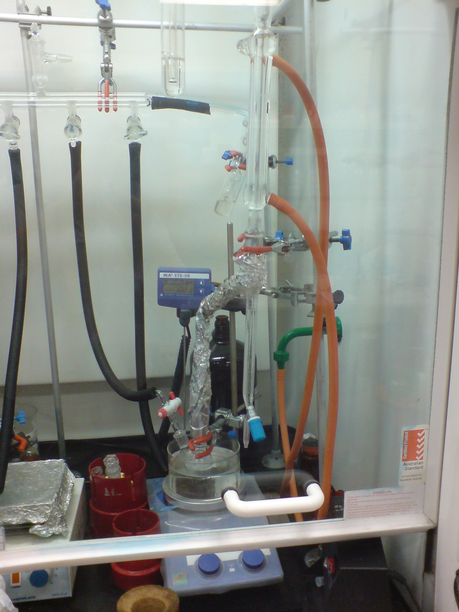 Dean Stark apparatus